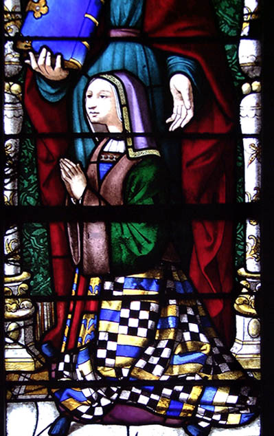 Vitrail d'Anne Pot (1475-1510), église Saint-Martin de Montmorency (Val d'Oise)